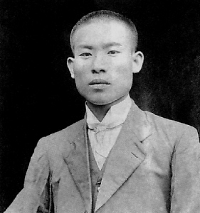 倪蔣懷